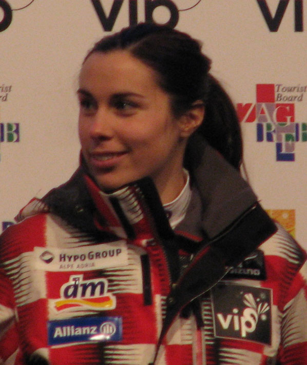 Matea Ferk